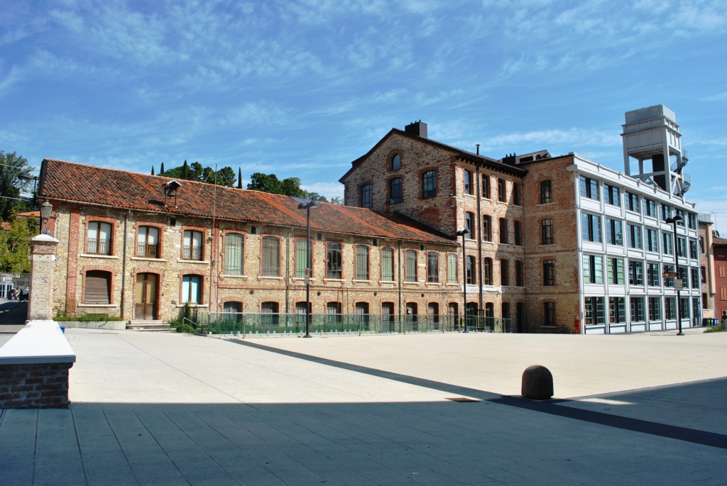 Piazza Alvise Conte e busto di Alvise Conte This is a photo of a monument which is part of cultural heritage of Italy.